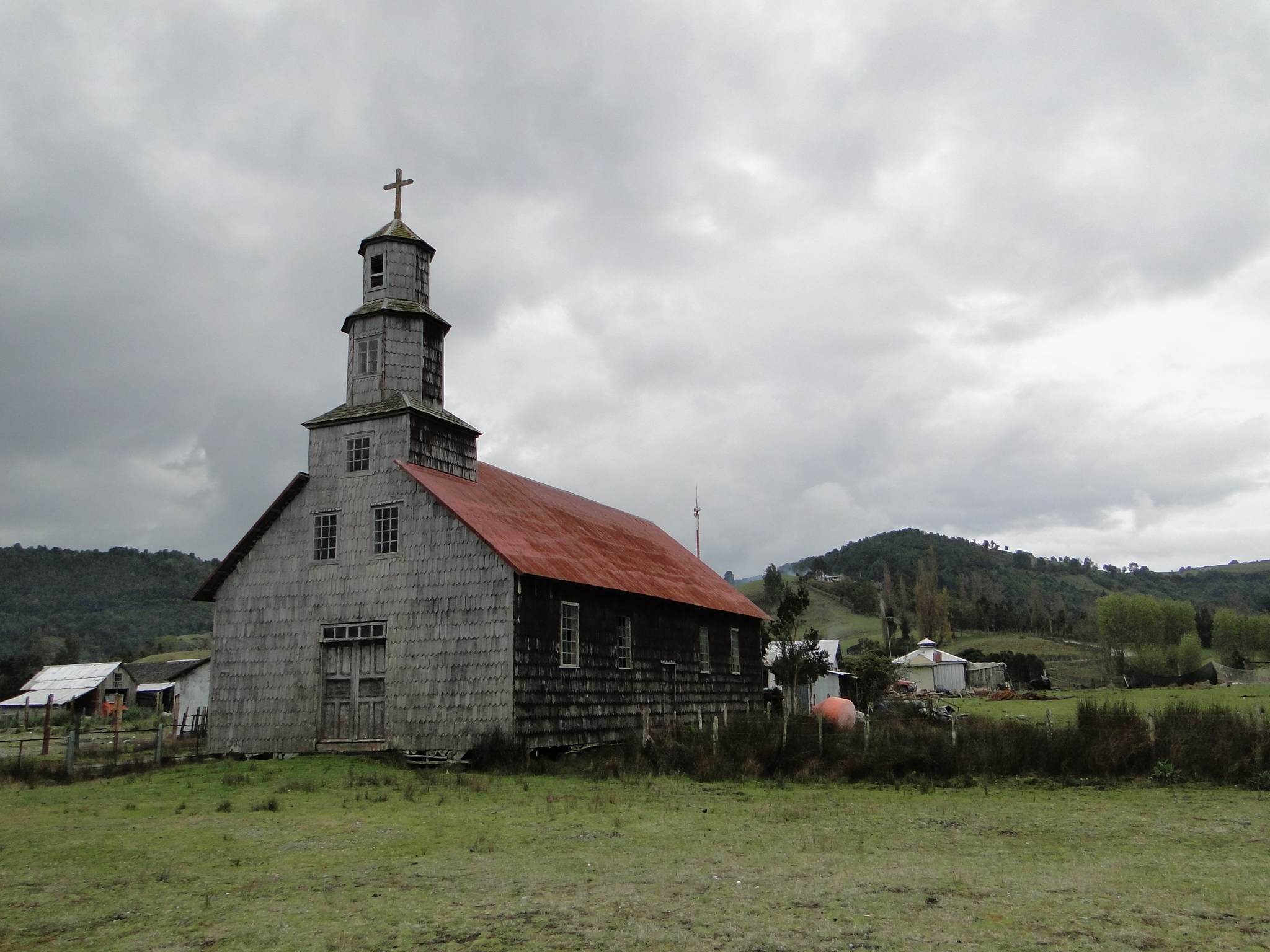 Iglesia Chullec, Curaco de Vélez (isla Quinchao), Chiloé, Chile